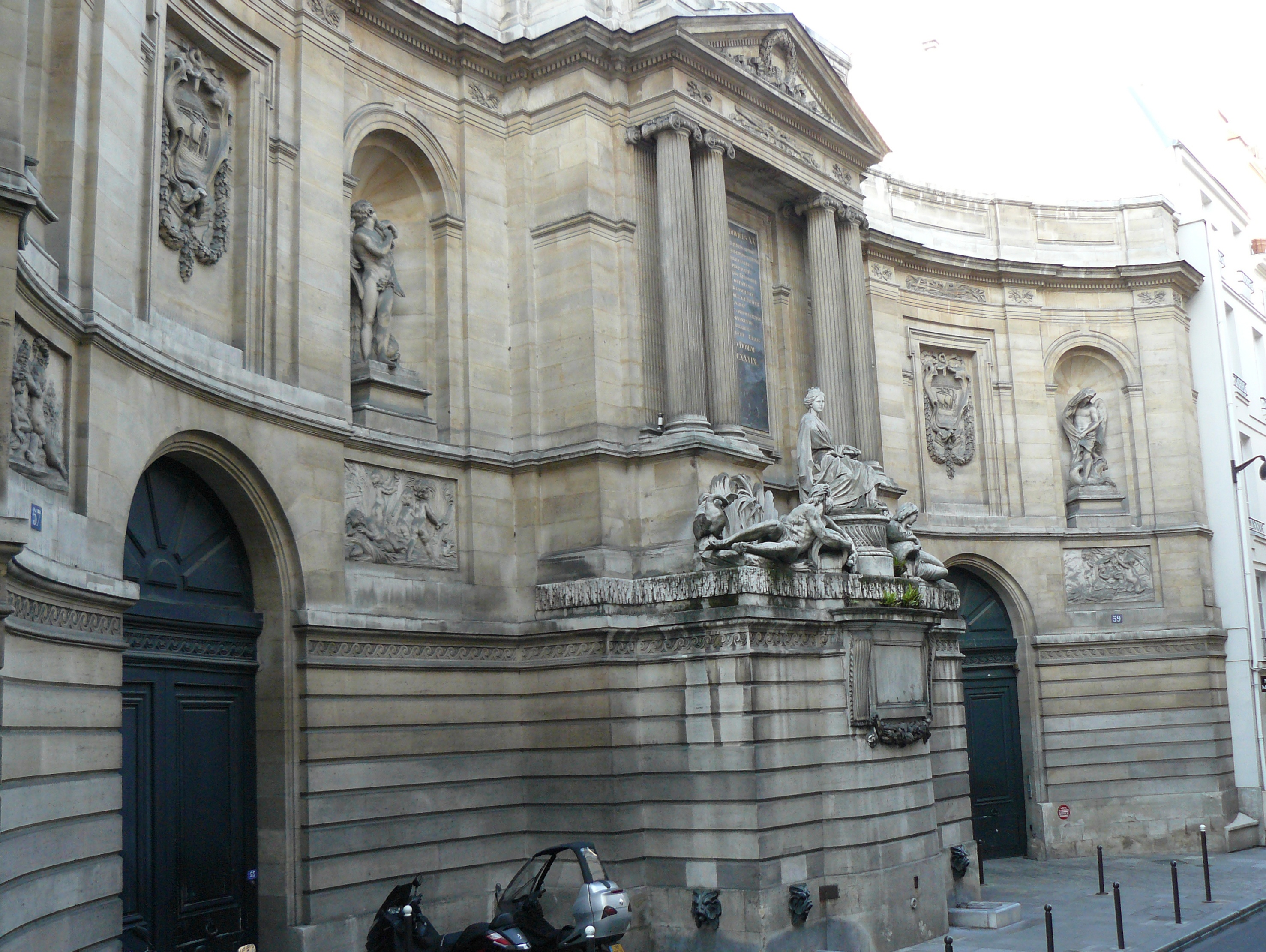 Paris 7ème - Vue d'ensemble coté gauche